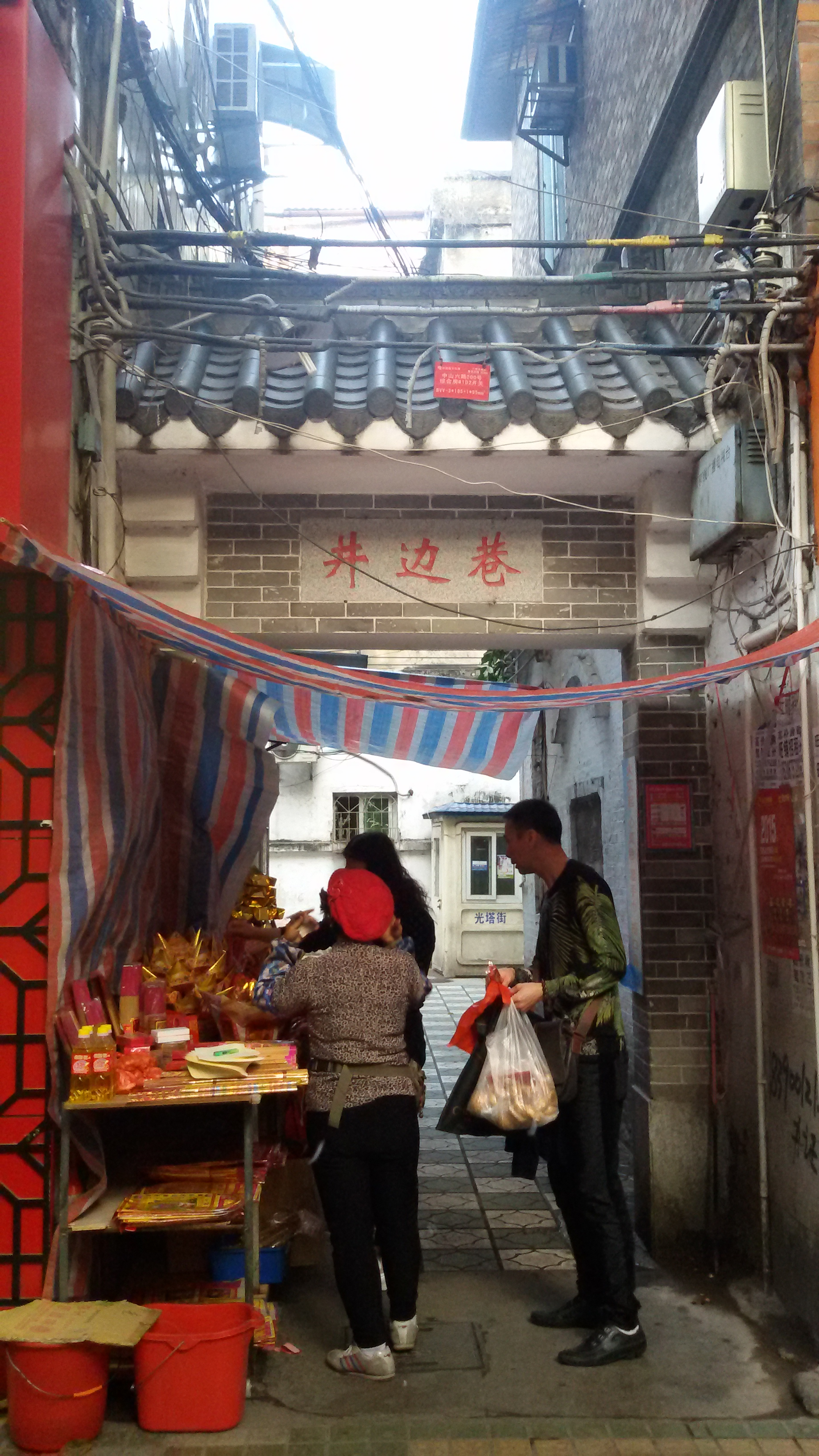 粵語: 而家嘅井边巷